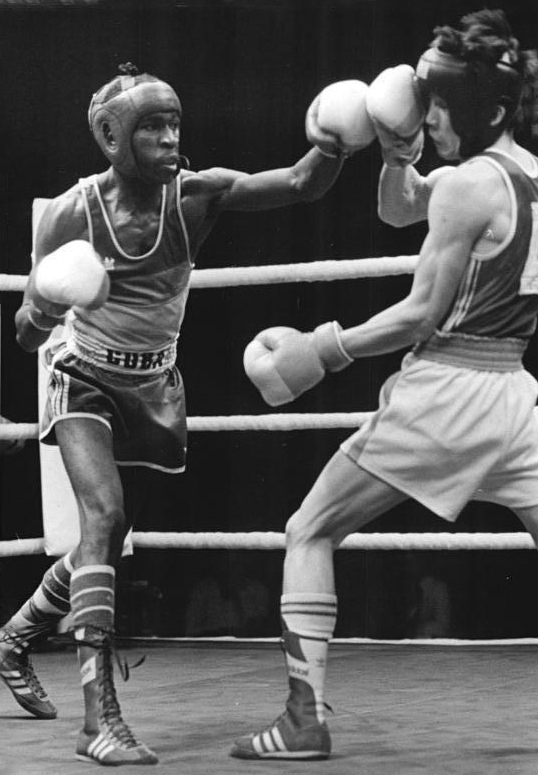 Pedro-Orlando Reyes, Möndchshargan Mönchöögiju ADN-ZB Lehmann 3.3.88 Halle: XVII. Internationales Boxturnier um den Chemiepokal-Viertelfinale-Zum zweiten Mal vorzeitig gewann Weltmeister und Weltcupsieger Pedro-Orlando Reyes (Kuba, l.), der hier Möndchshargan Mönchöögiju (MVR) durch RSC-Head in der zweiten Runde besiegt.